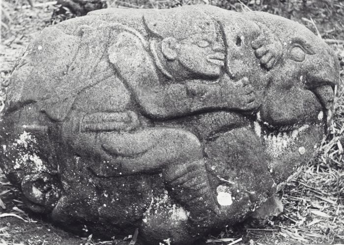 Foto. Megalitisch beeld in Batoegadjah